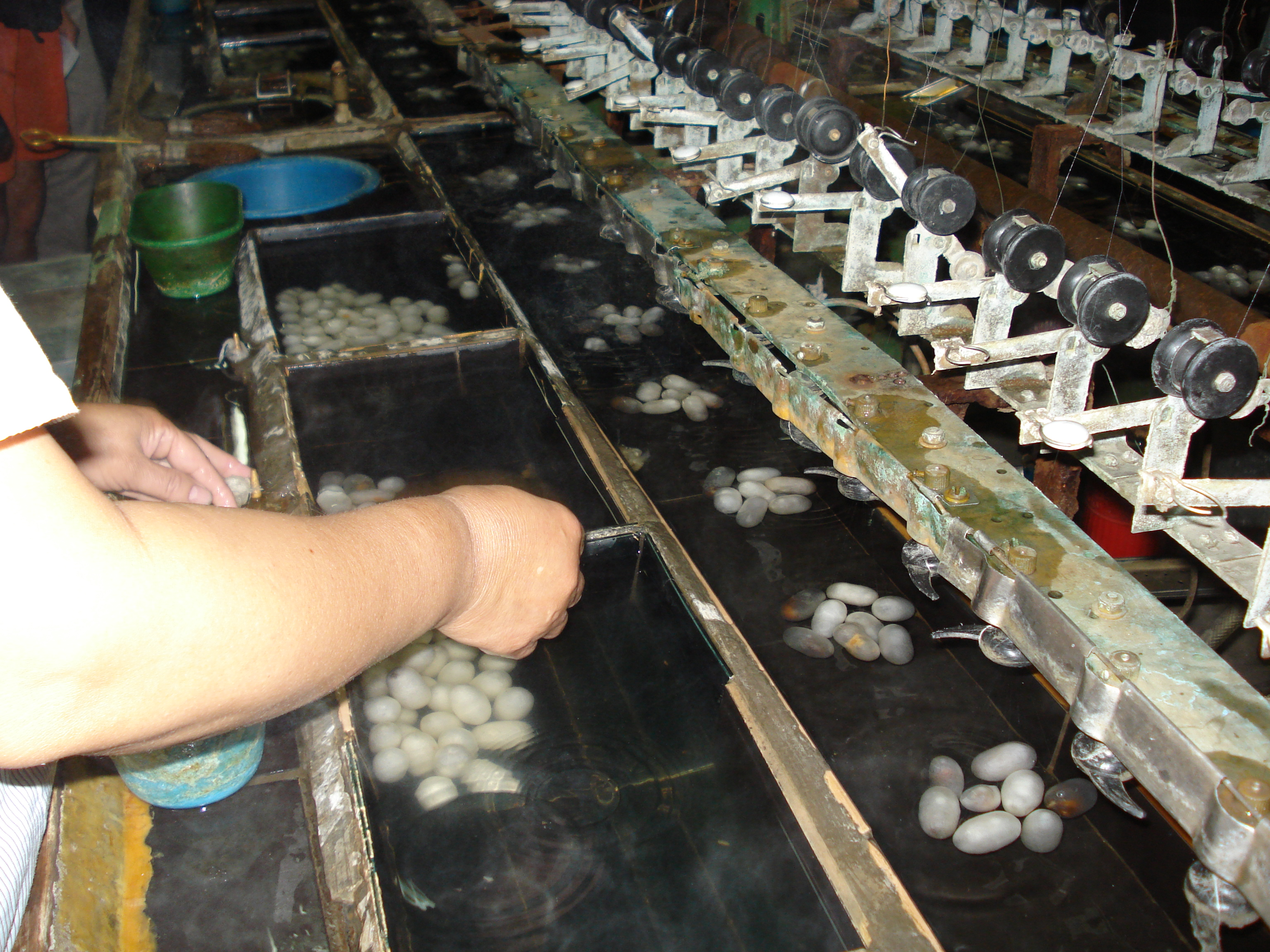 tkalnia jedwabiu Shuzou - wysnuwanie nici z kokonów jedwabników